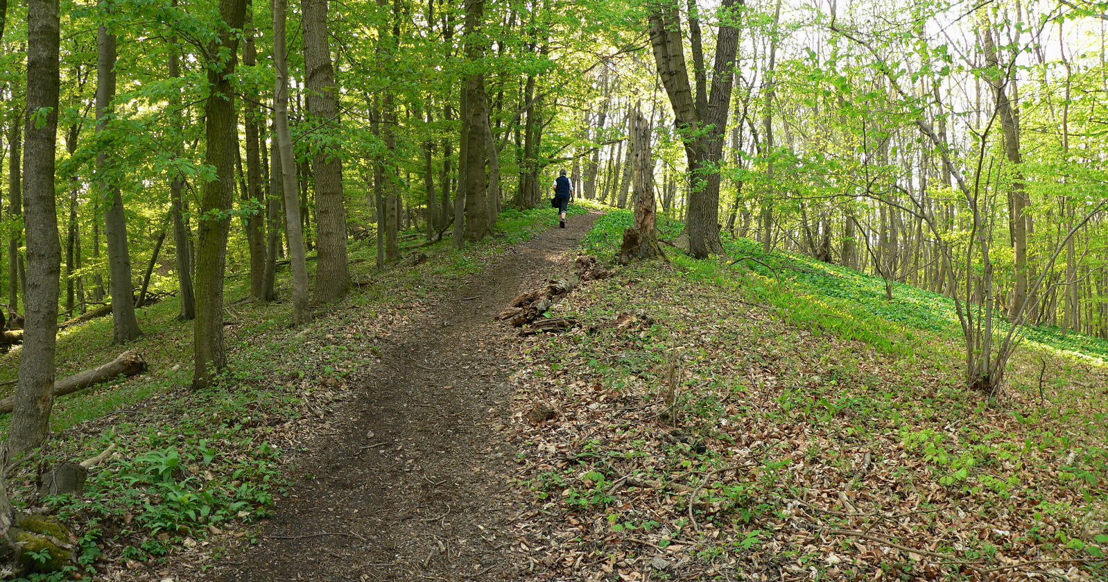 Wanderweg auf dem Kamm des Harly